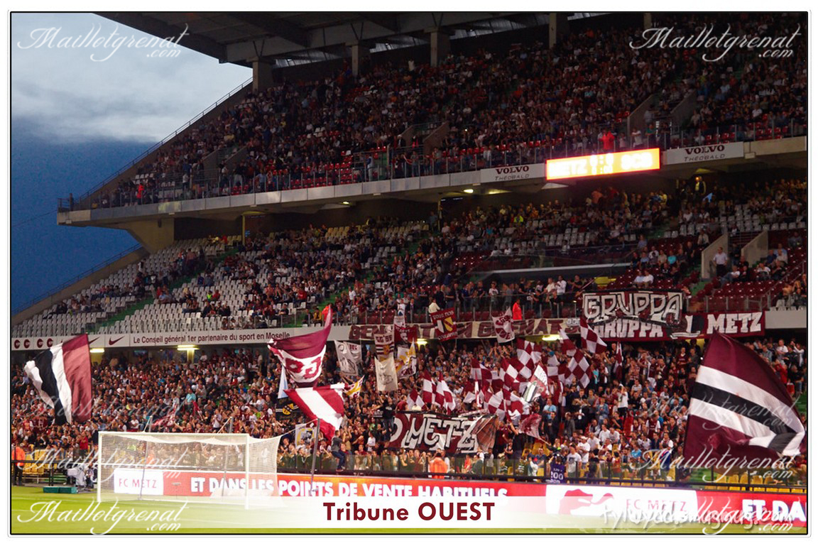 Supporters de la generation grenat et gruppa metz